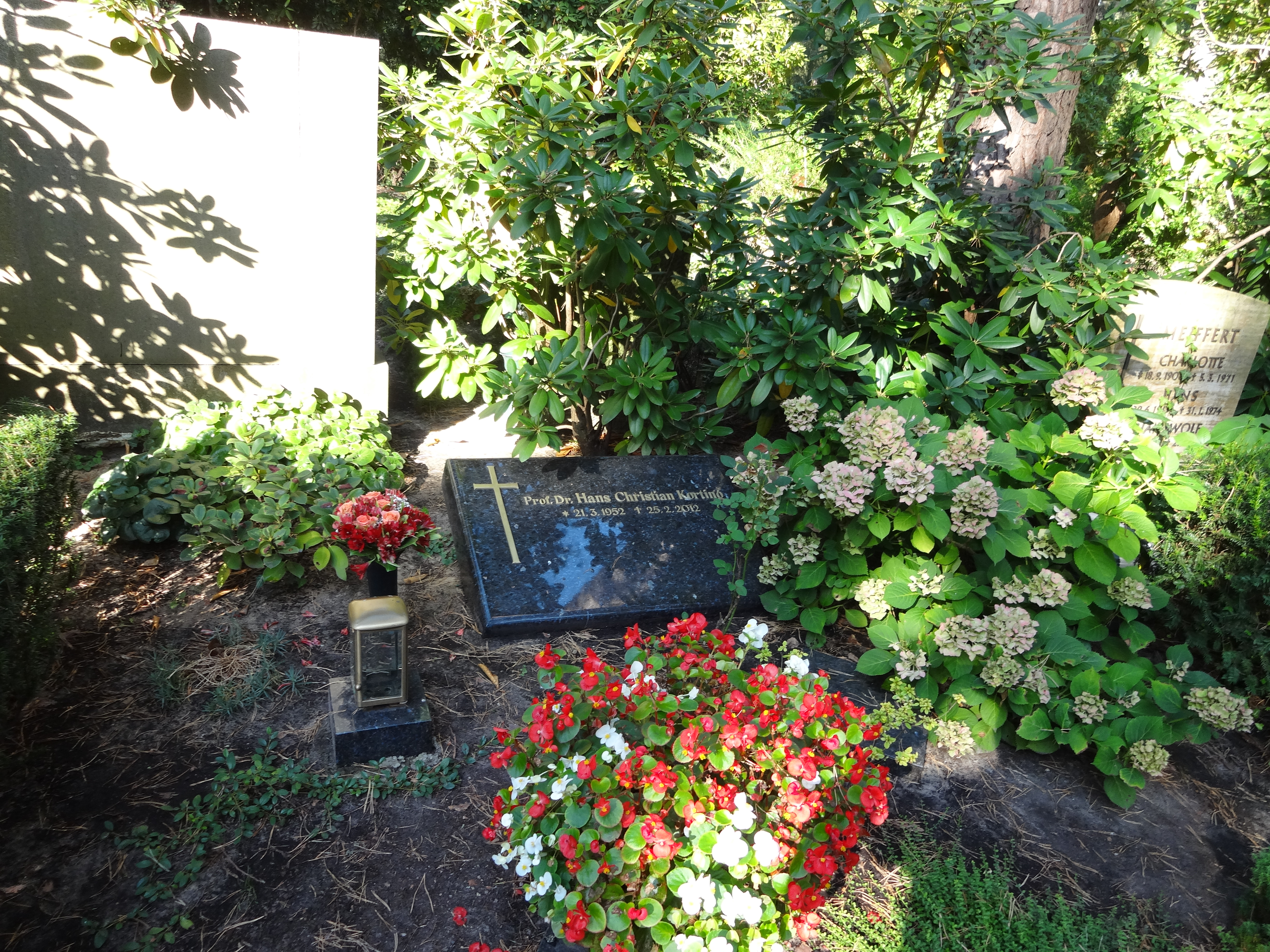 Grab Prof. Hans Christian Korting auf dem Waldfriedhof Dahlem in Berlin